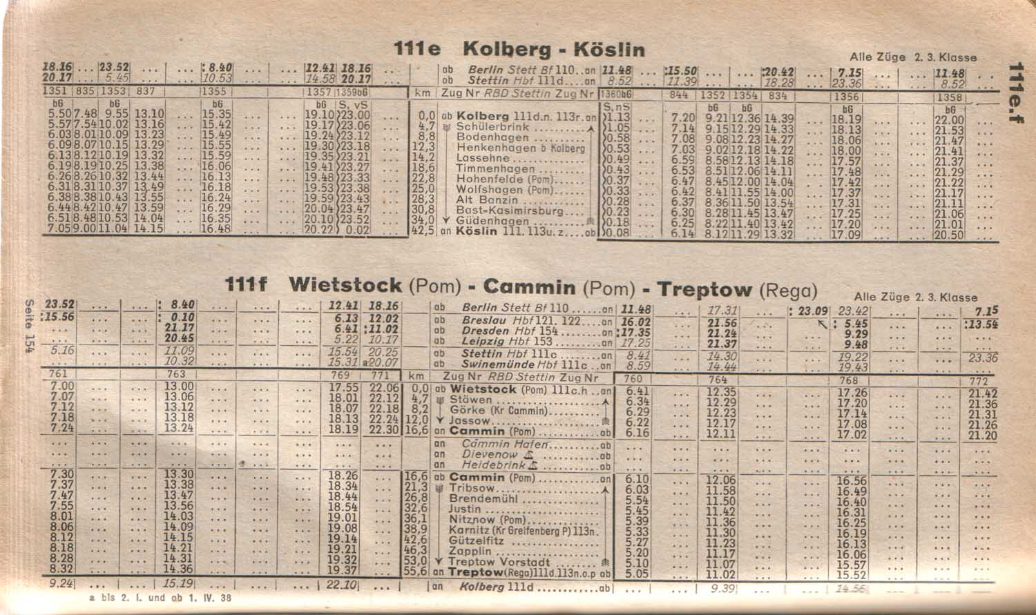 rozkład jazdy pociągów na linii Kamień Pomorski - Trzebiatów